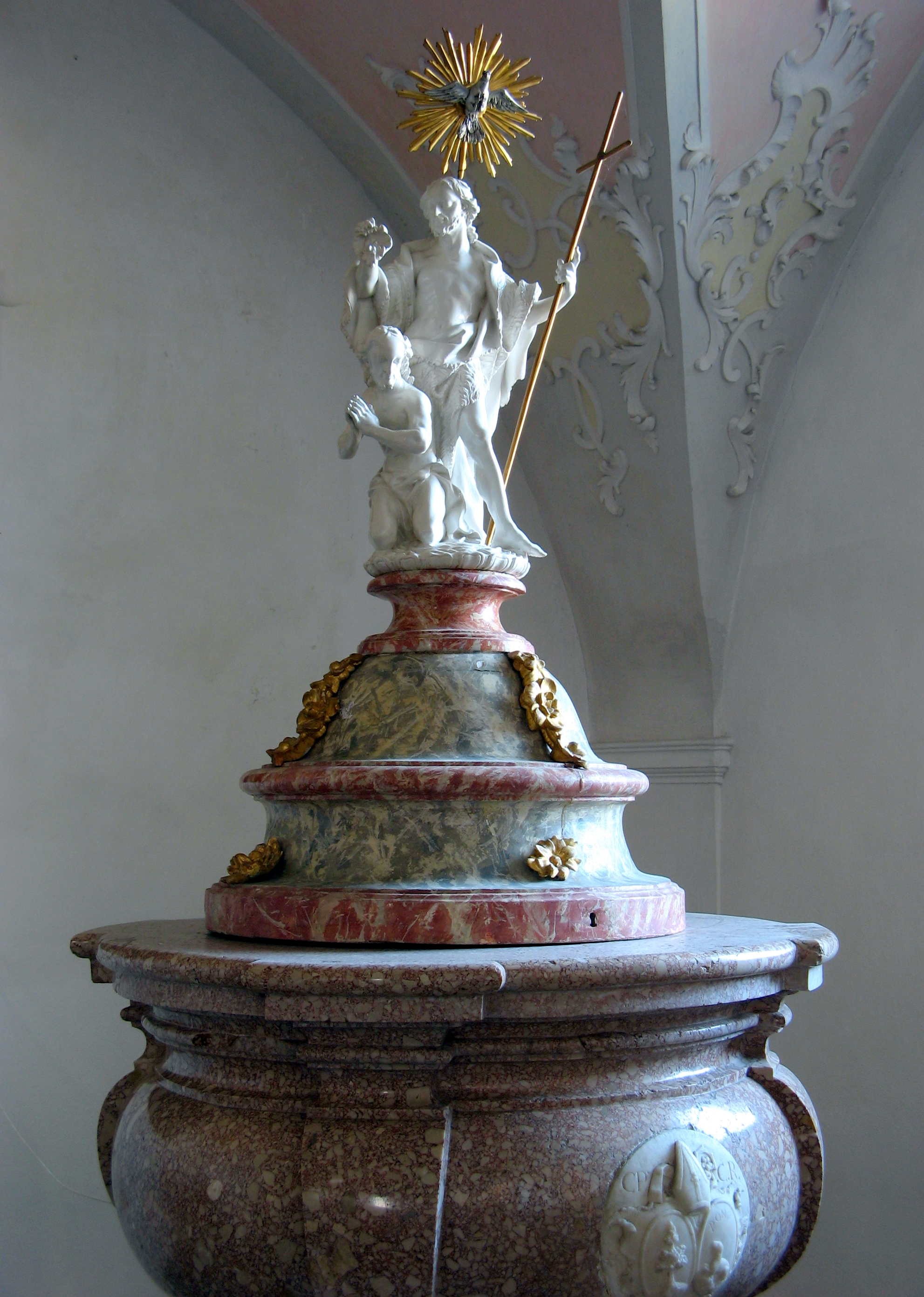 Taufstein von Anton Sturm in der Pfarrkirche in Rottenbuch